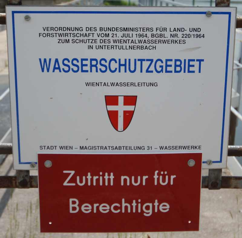 Das ehemalige Wientalwasserwerk der Stadt Wien – MA 31 Wasserwerke in Untertullnerbach (Niederösterreich) - Tafel, die auf das Wasserschutzgebiet hinweist